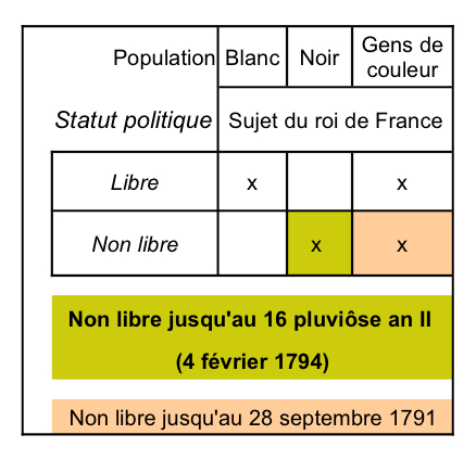 Statut politique des populations dans les colonies française d'Amérique au 16 pluviôse an II (4 février 1794)